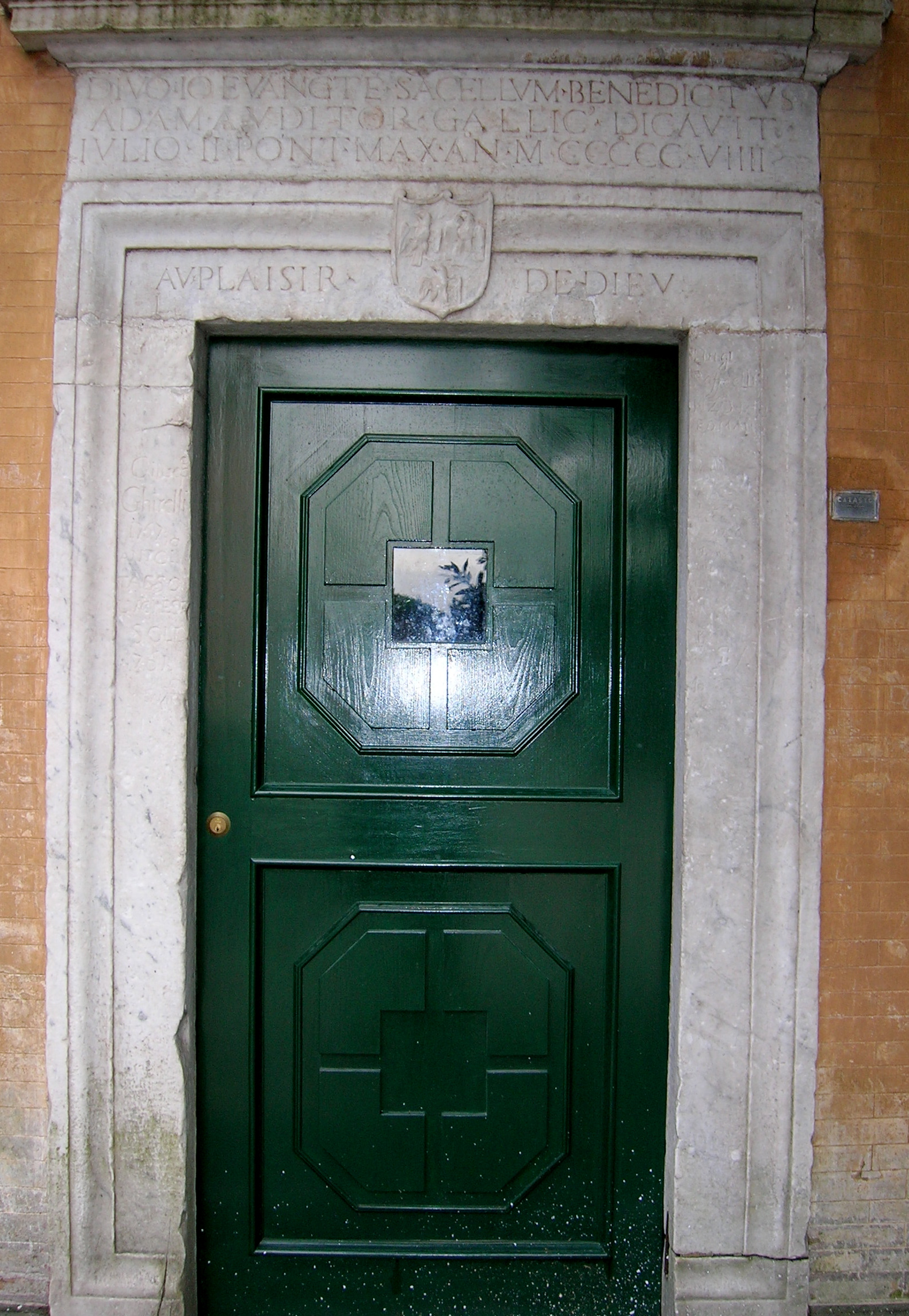 Porte de l'oratoire San Giovanni in Oleo, avec le motto 'Au plaisir de Dieu'